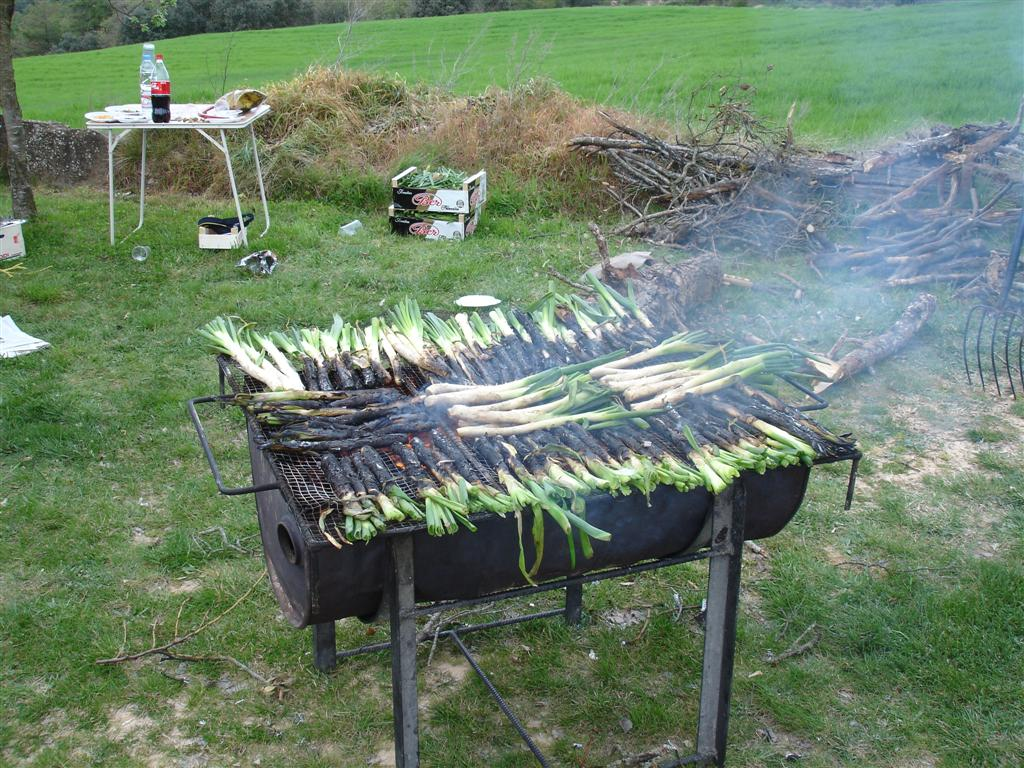 Calçots